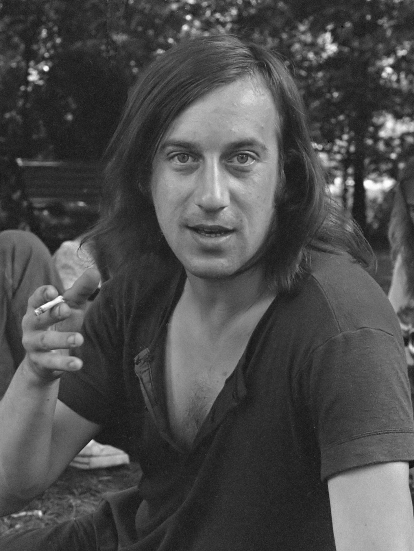 Jur Naassens (stichting Jeugd en Muziek), opdracht Gelderlander (kop) 19 juli 1972